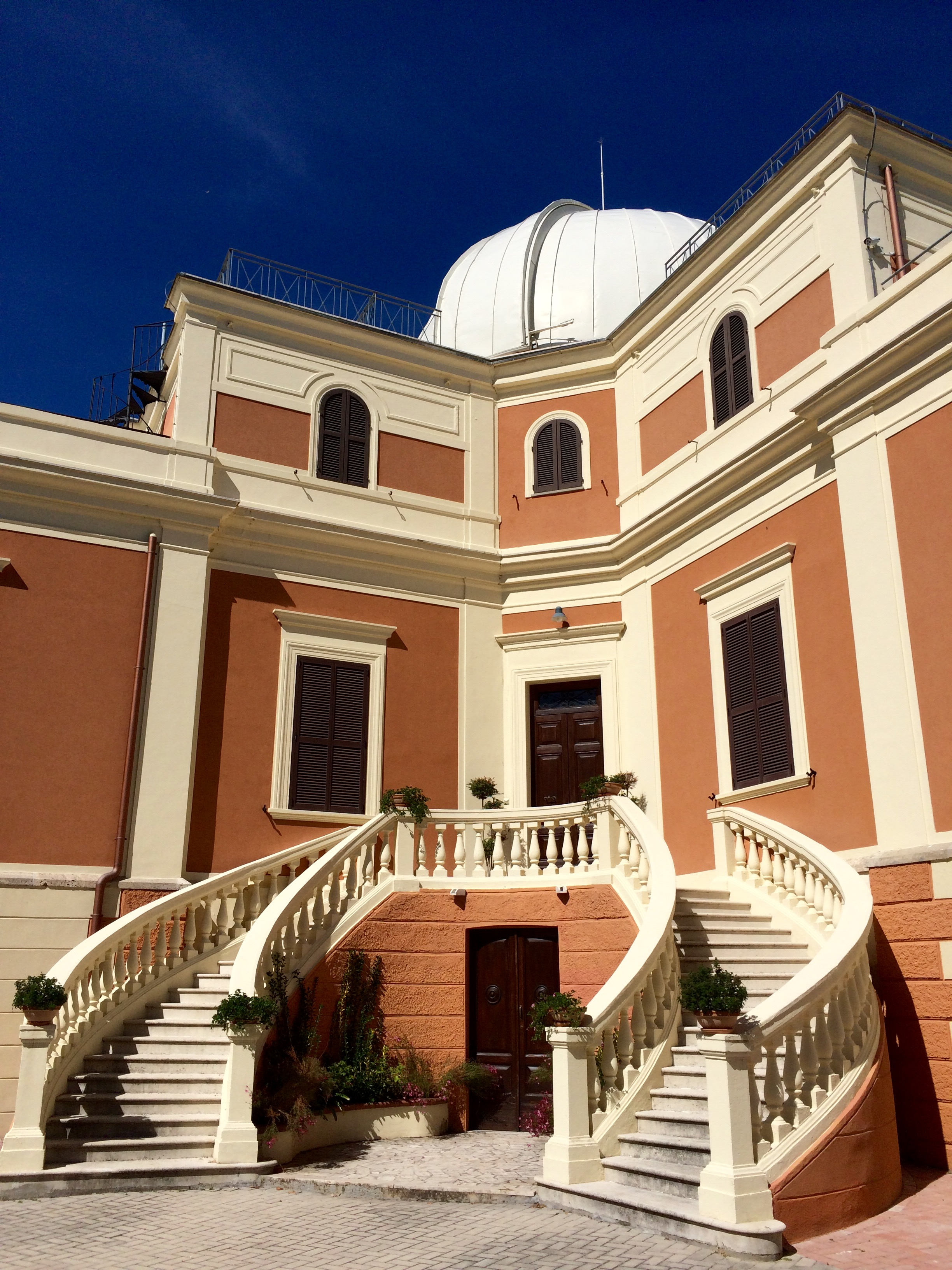 Osservatorio astronomico d'Abruzzo - Il padiglione principale